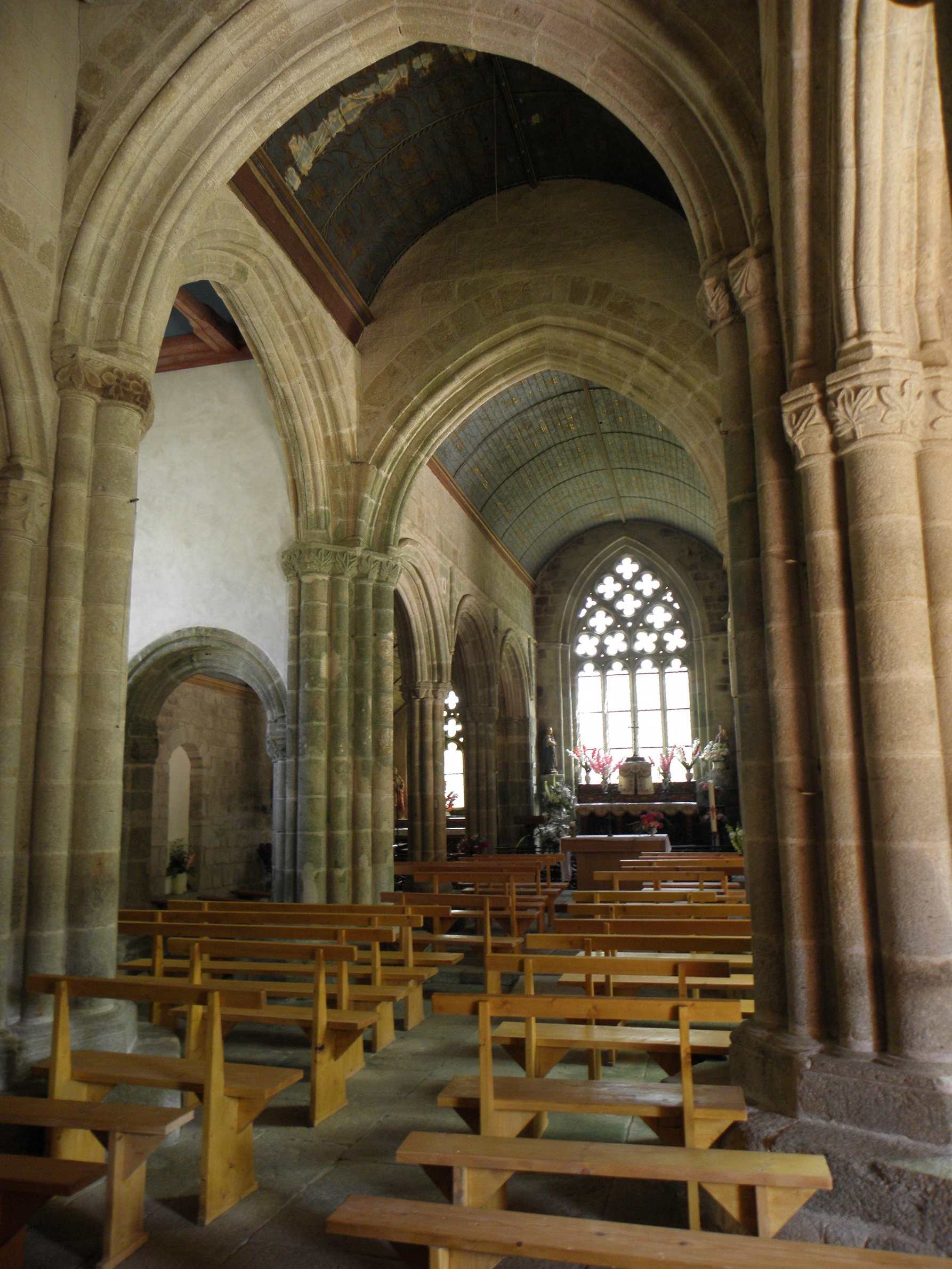 Chapelle Notre-Dame-de-Kérinec en Poullan-sur-Mer (29). Le transept et le chœur.